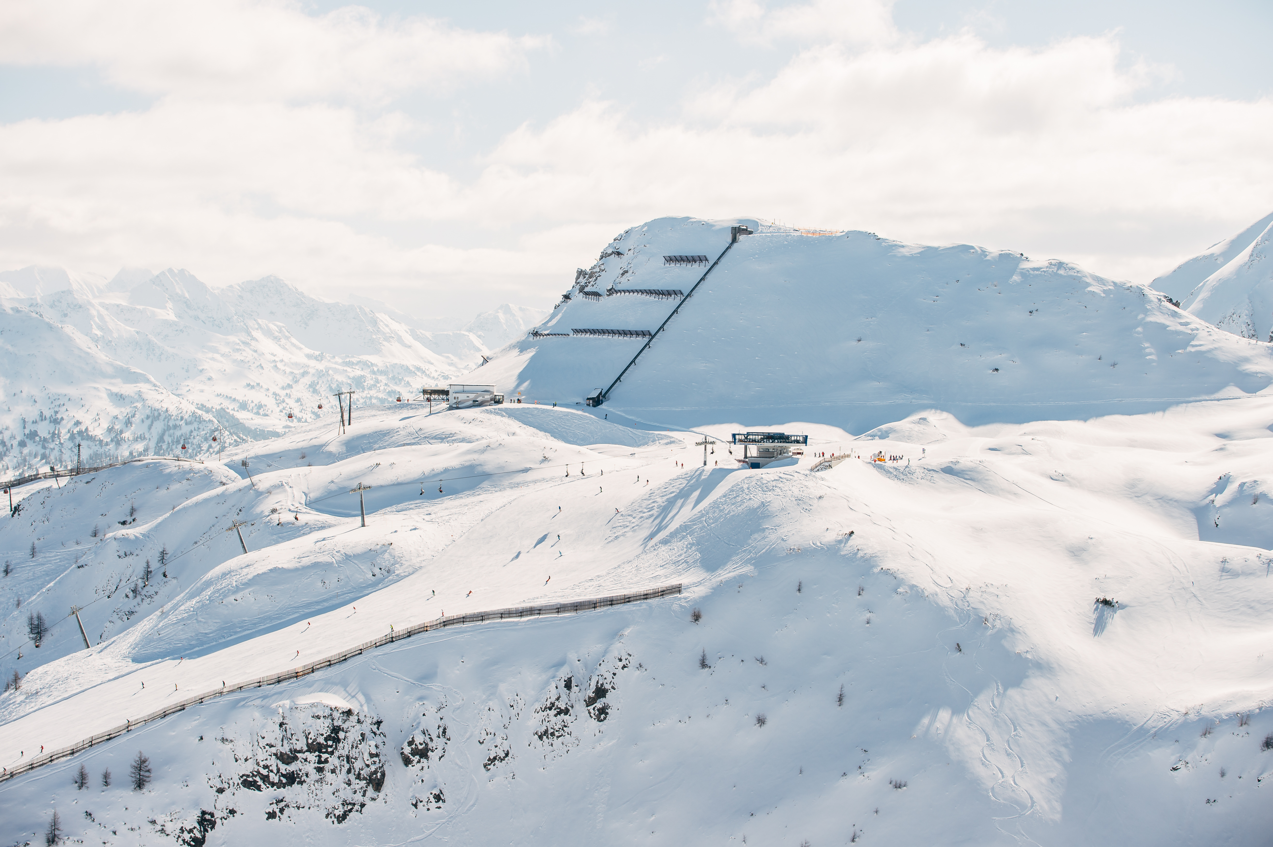 Skigebiet Zauchensee mit Blick auf den Start der Weltcupabfahrt!